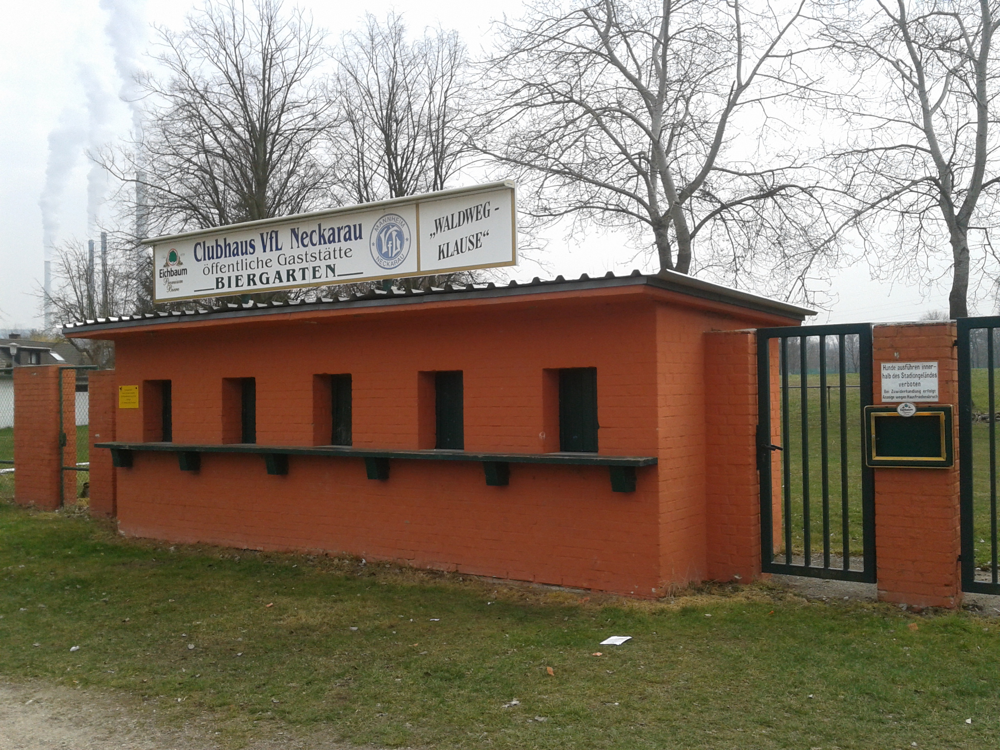 VfL Neckarau